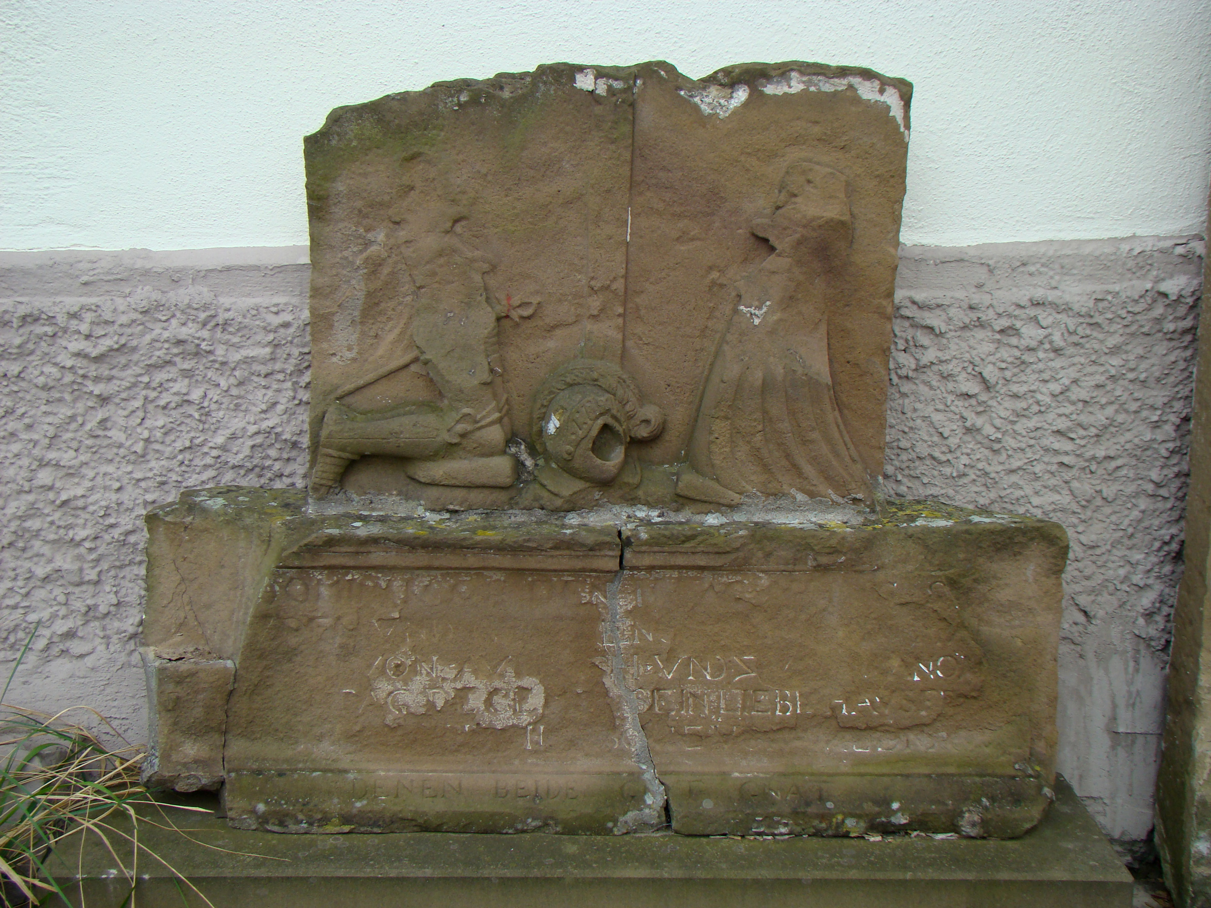 Historisches Grabmal bei der Kirche in Bönnigheim-Hofen